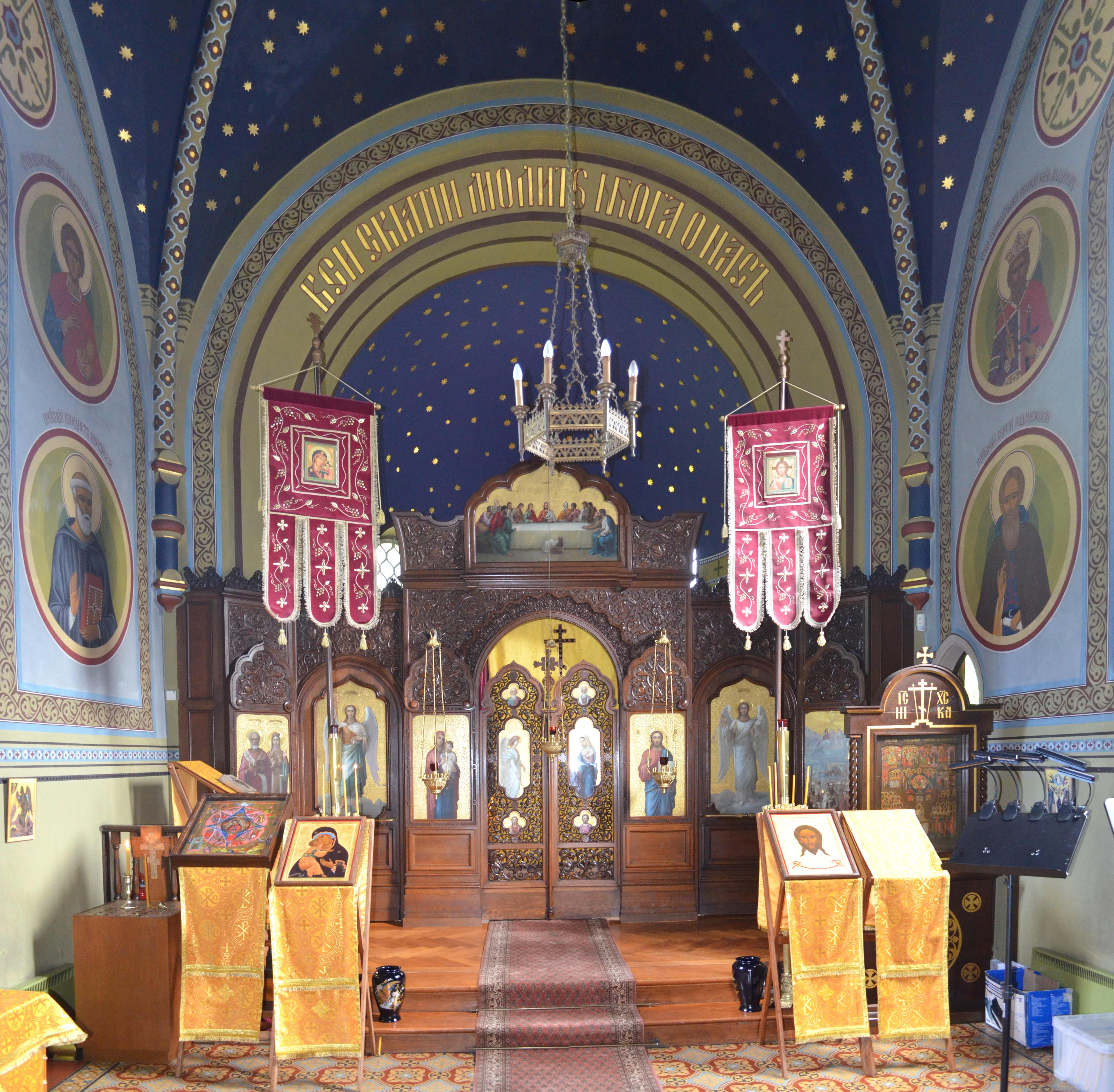 Bad Homburg, Russische Kapelle, Innen